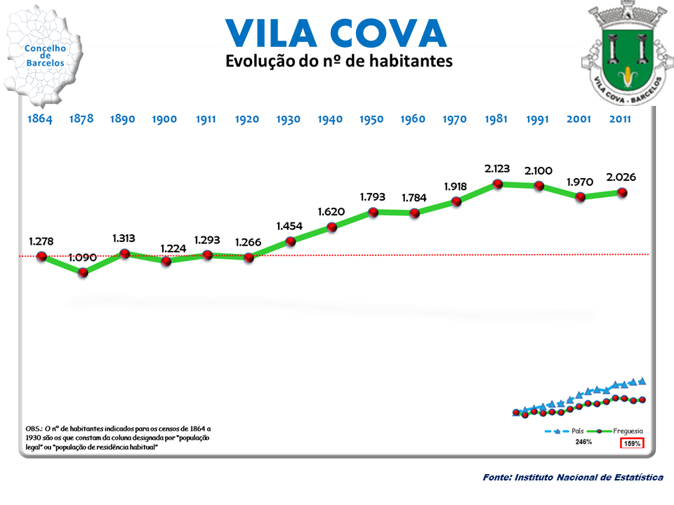 Censos 1864/2011